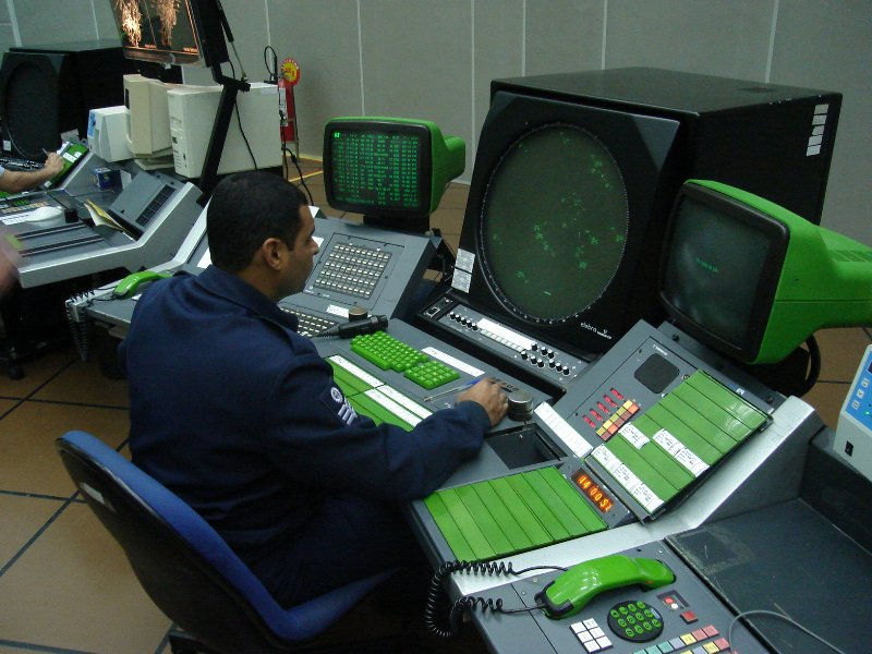 Controladores de trafego aereo.